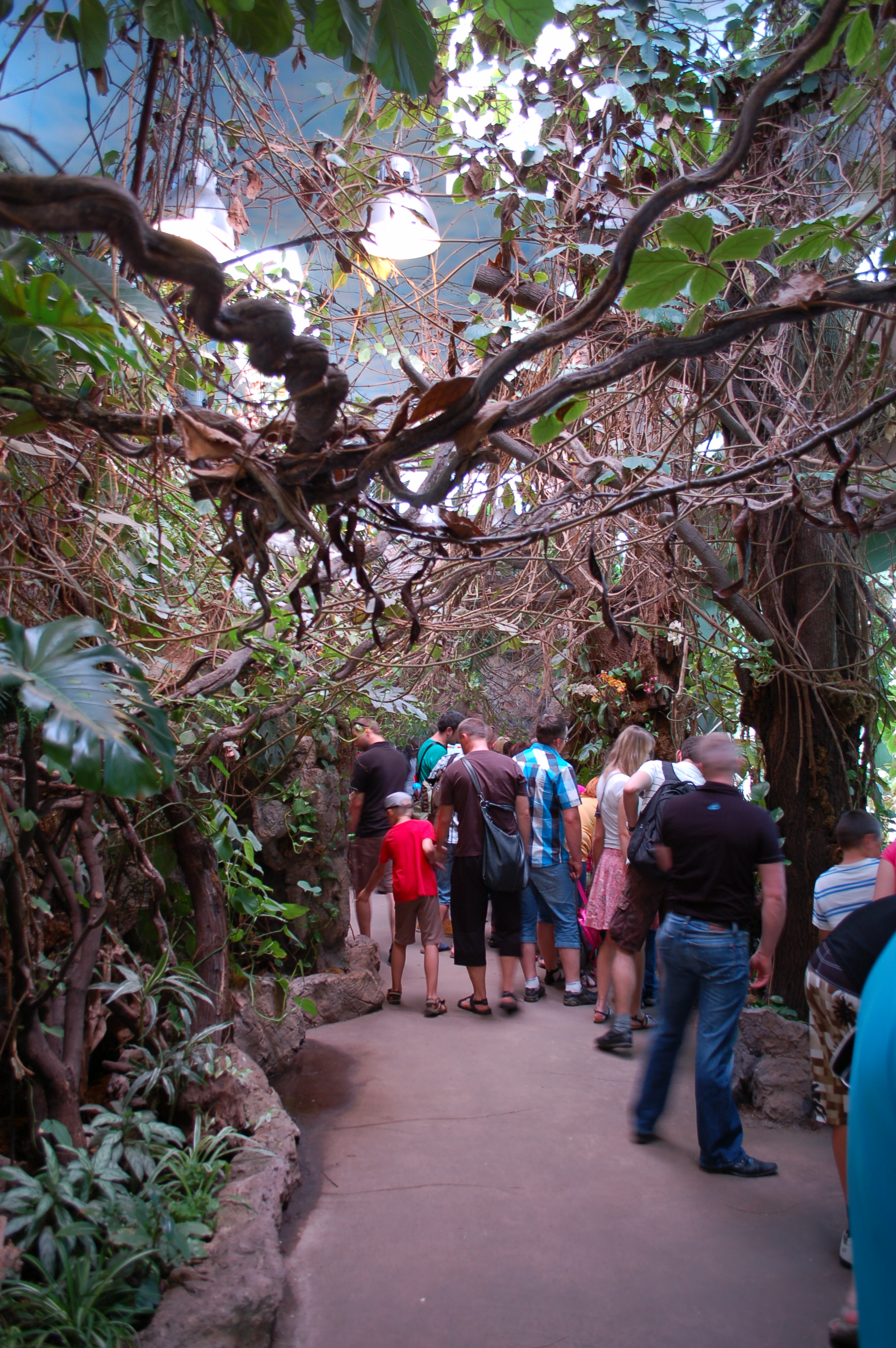 Warschauer Zoo Frühling 2012